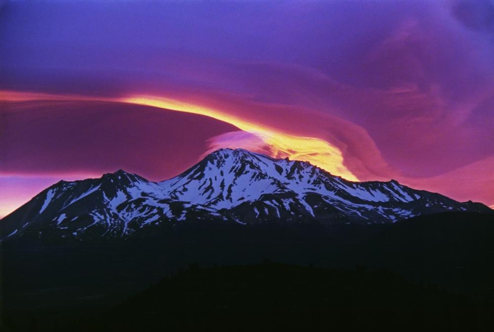 Sunrise on Mount Shasta.